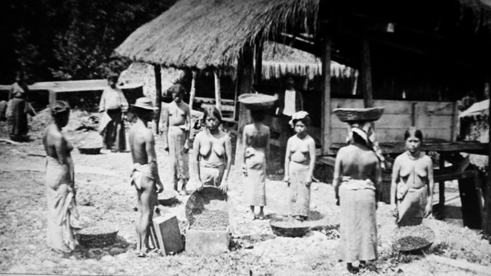 Temporeras indígenas en las plantaciones de café en 1875.